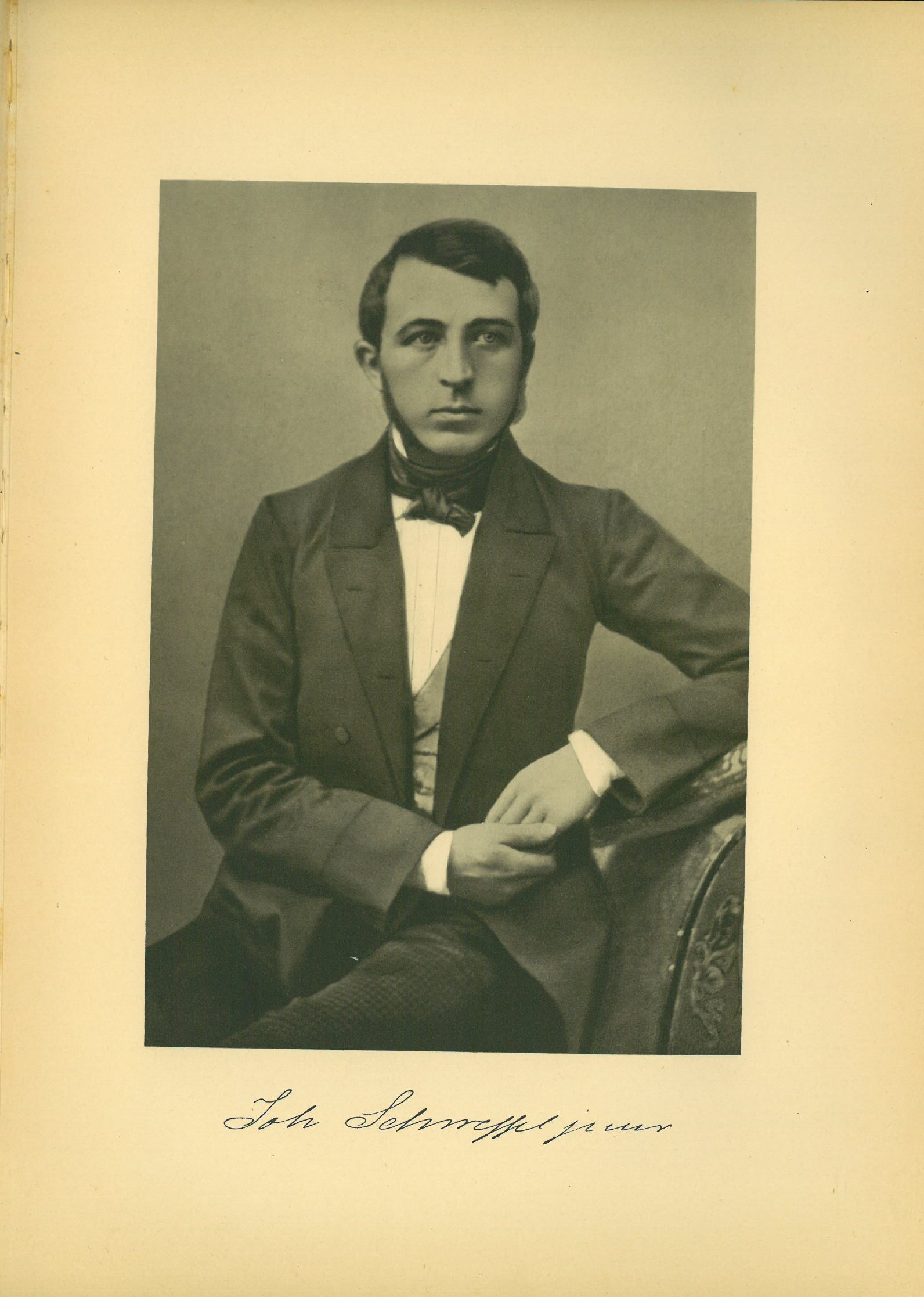 Bild des Johann Schweffel IV. (* 12. Mai 1825 in Kiel; † 23. August 1910 ebenda), deutscher Kaufmann